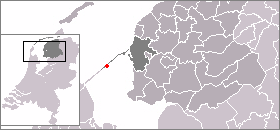 Kaart met de locatie van Breezanddijk, gemaakt uit sjabloon van Wikipedia-gebruiker Mtcv